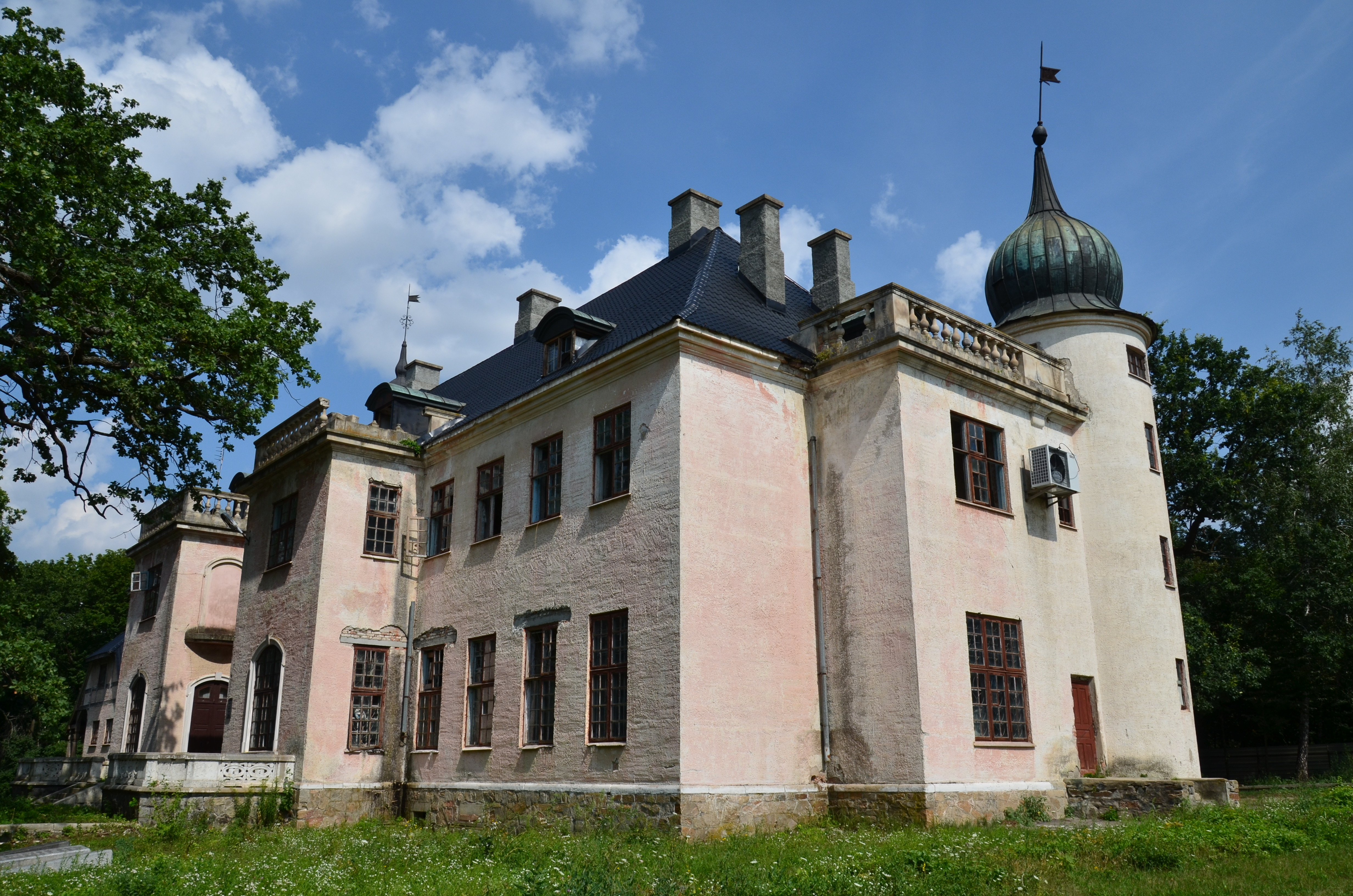 Палац мисливський Шувалова із парком, Тальне, вул. Радянська, 48